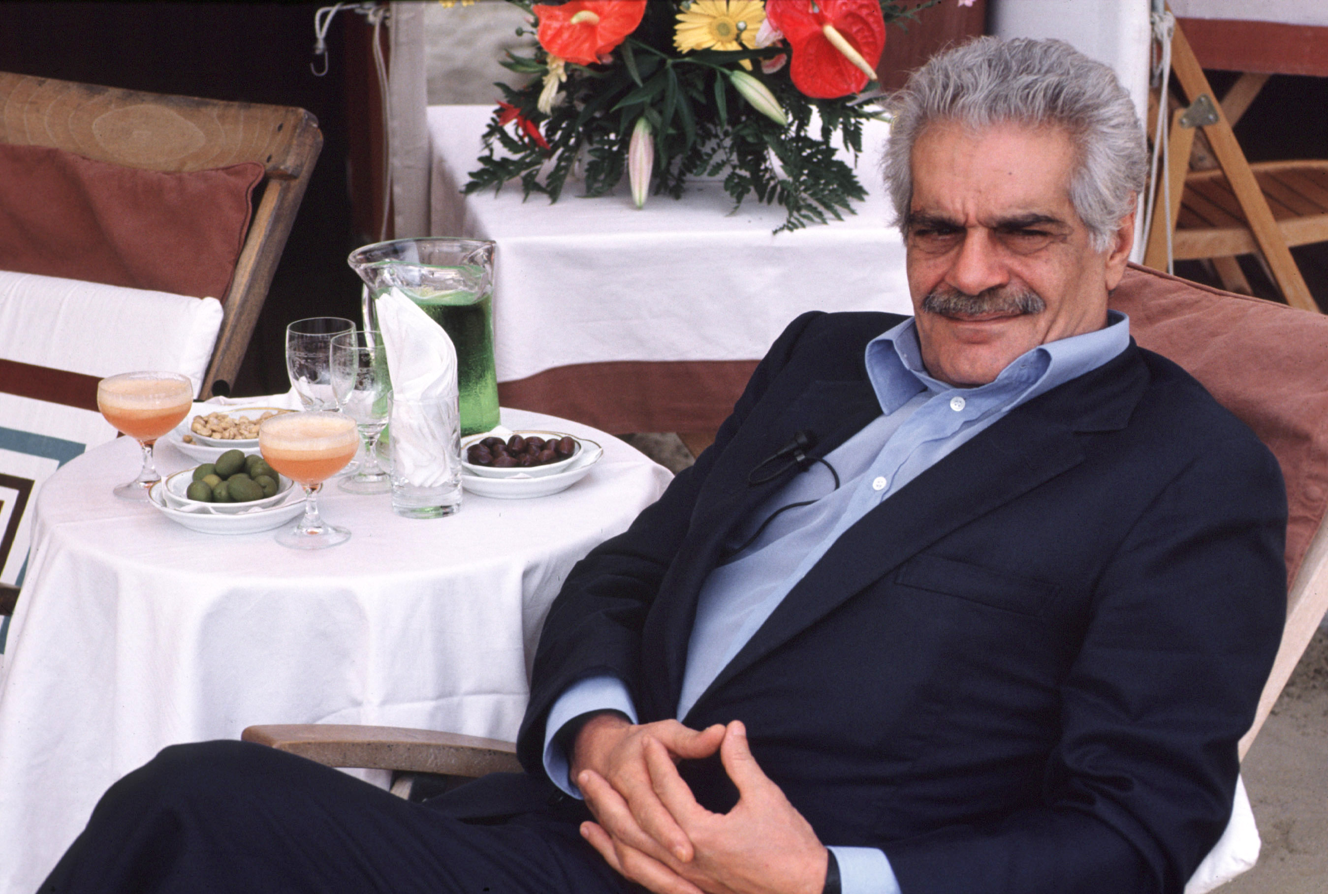 L'attore egiziano Omar Sharif alla Mostra del cinema di Venezia del1993